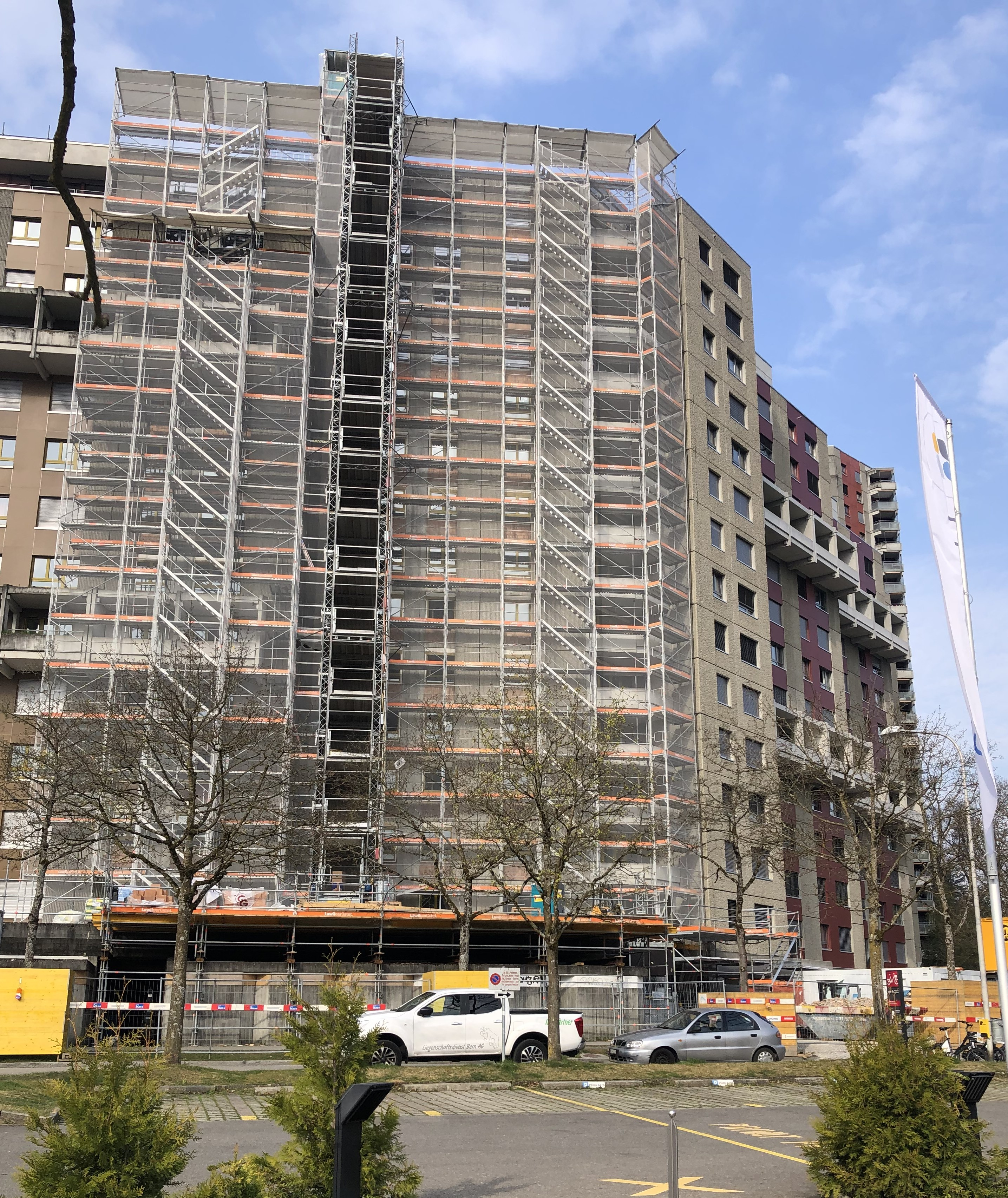 Holenacker Hochhausblick Block C (wird totalsaniert)